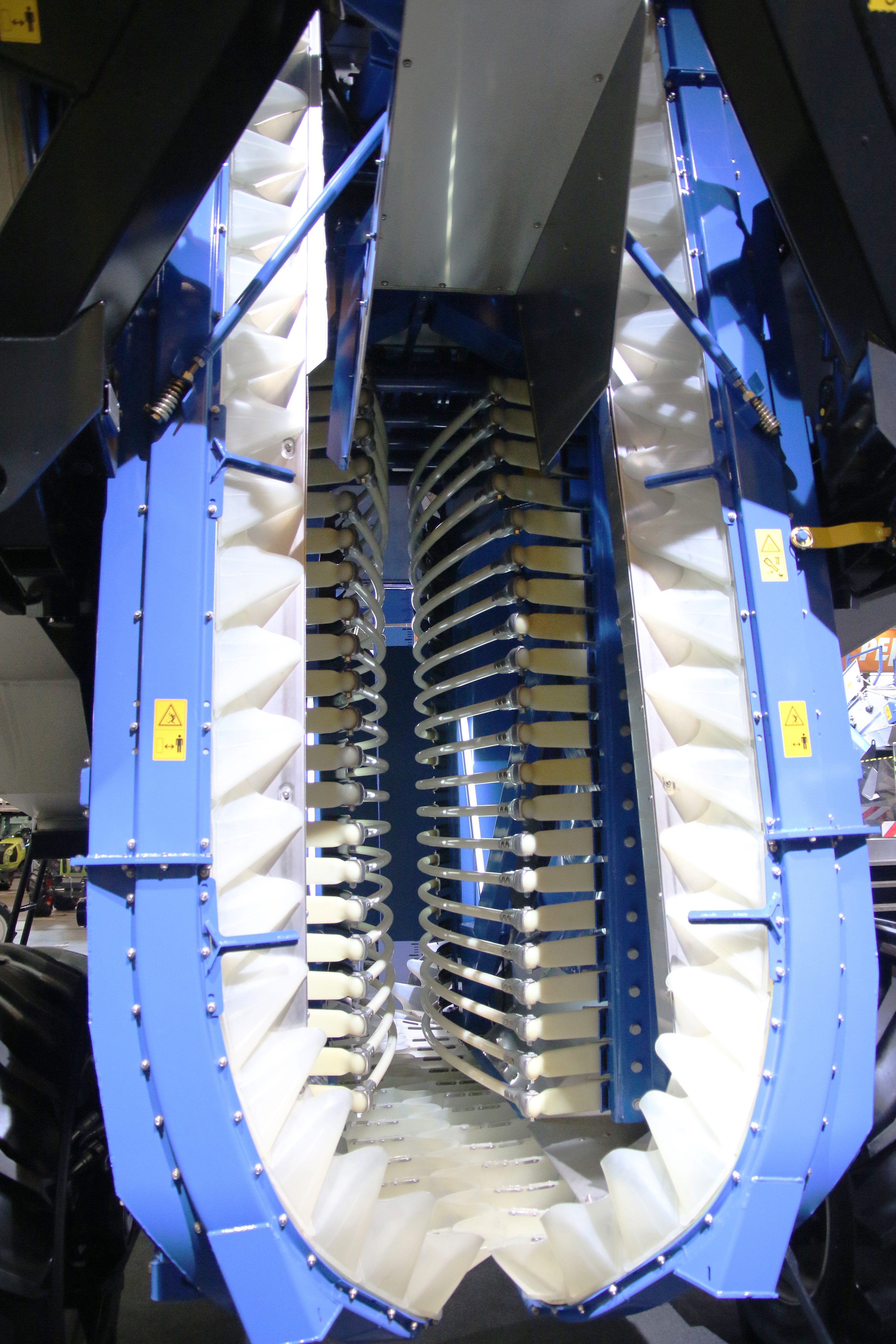 Schlagwerk und Becherförderer eines Traubenvollernters